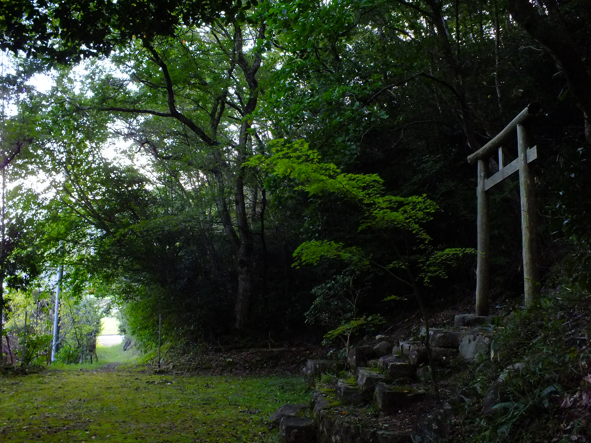 2015-09-14 Seto-Jizo Konda-cho,Sasayama,Hyogo,Japan 瀬戸地蔵手前の神社